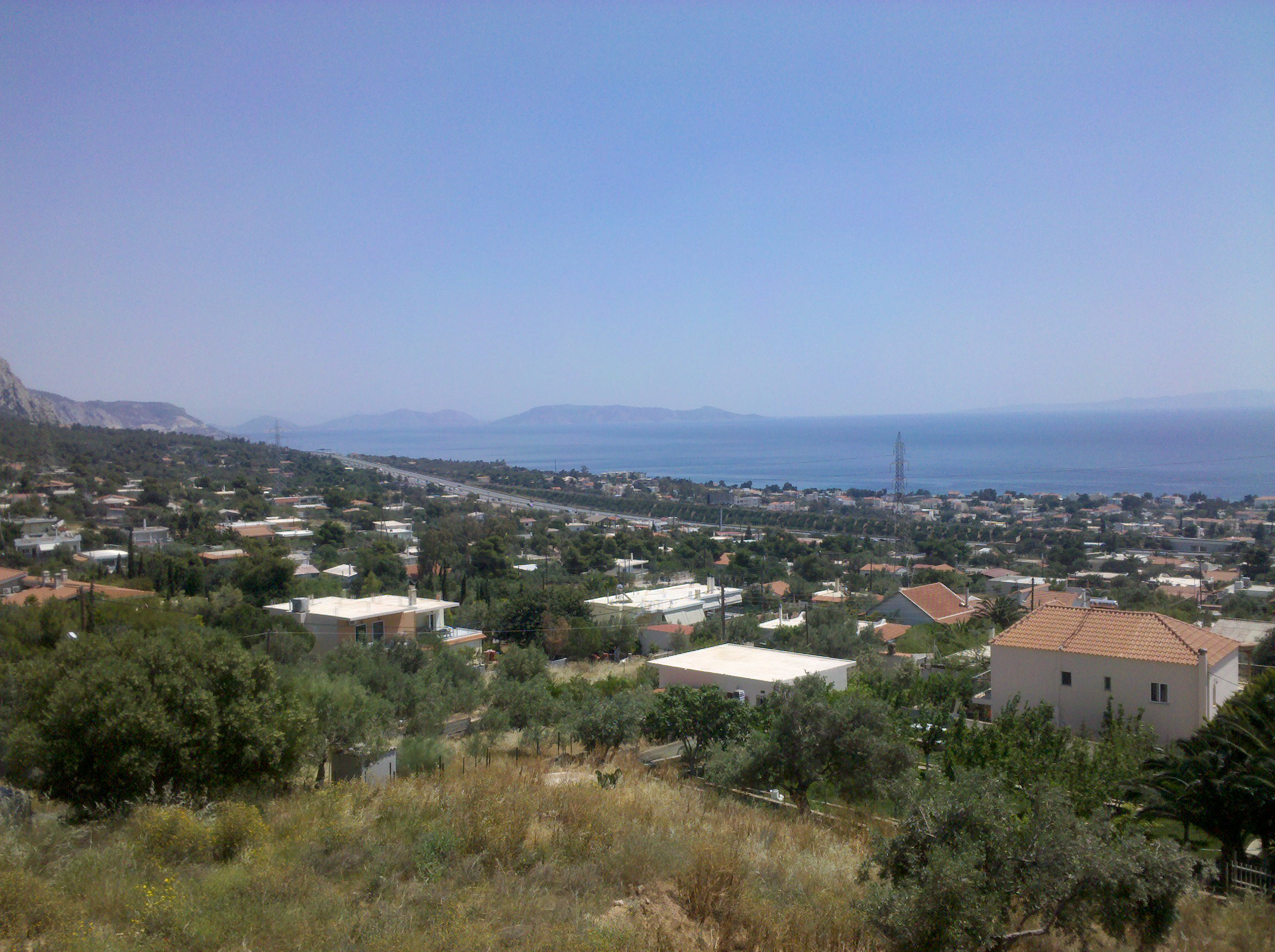 Kineta SE View